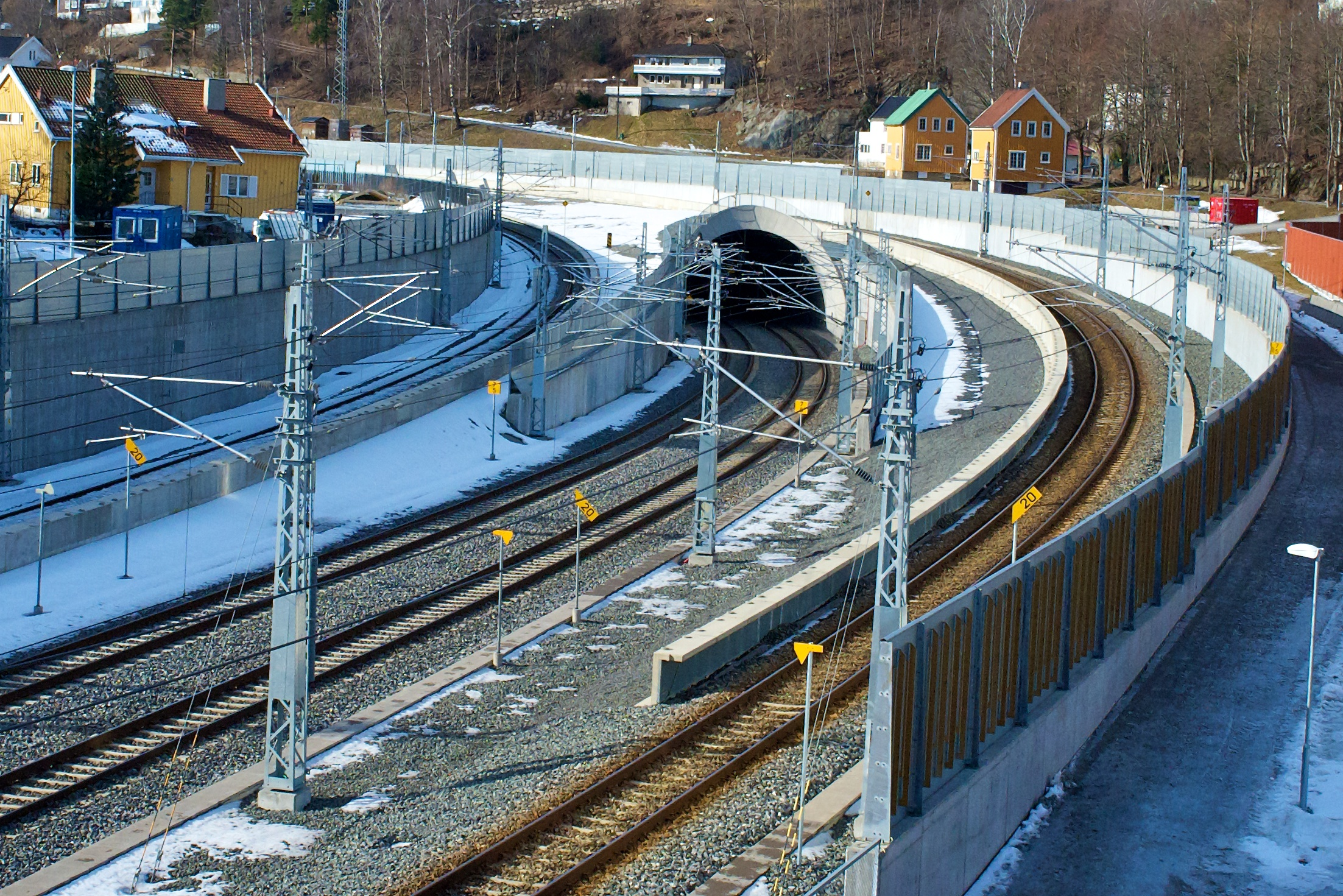 Bærumstunnelen, Lysaker-siden.